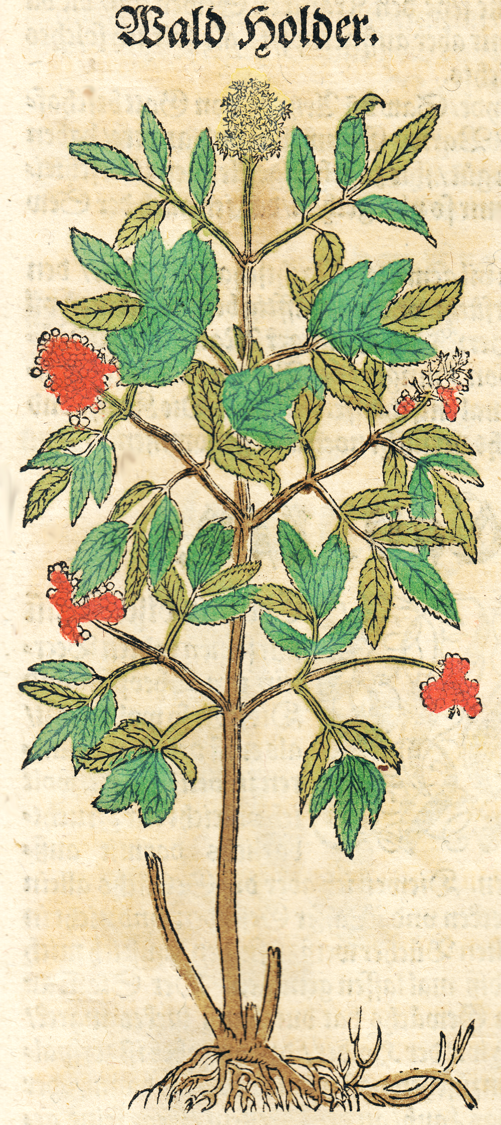 Abbildung des Roten Holunders.